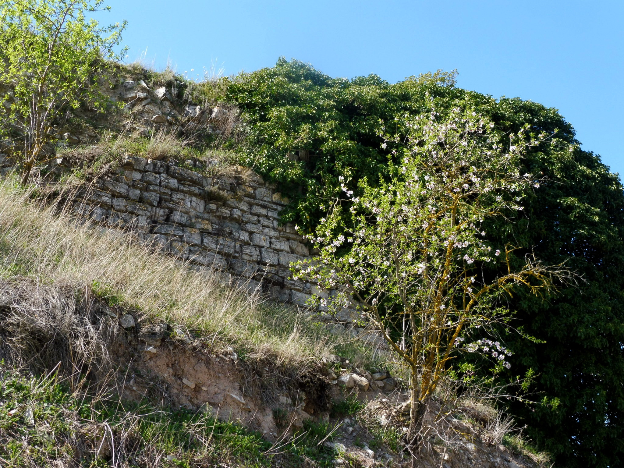 Castell de Rubinat (Ribera d'Ondara)